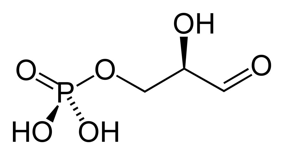 Glyceraldehyde 3-phosphate